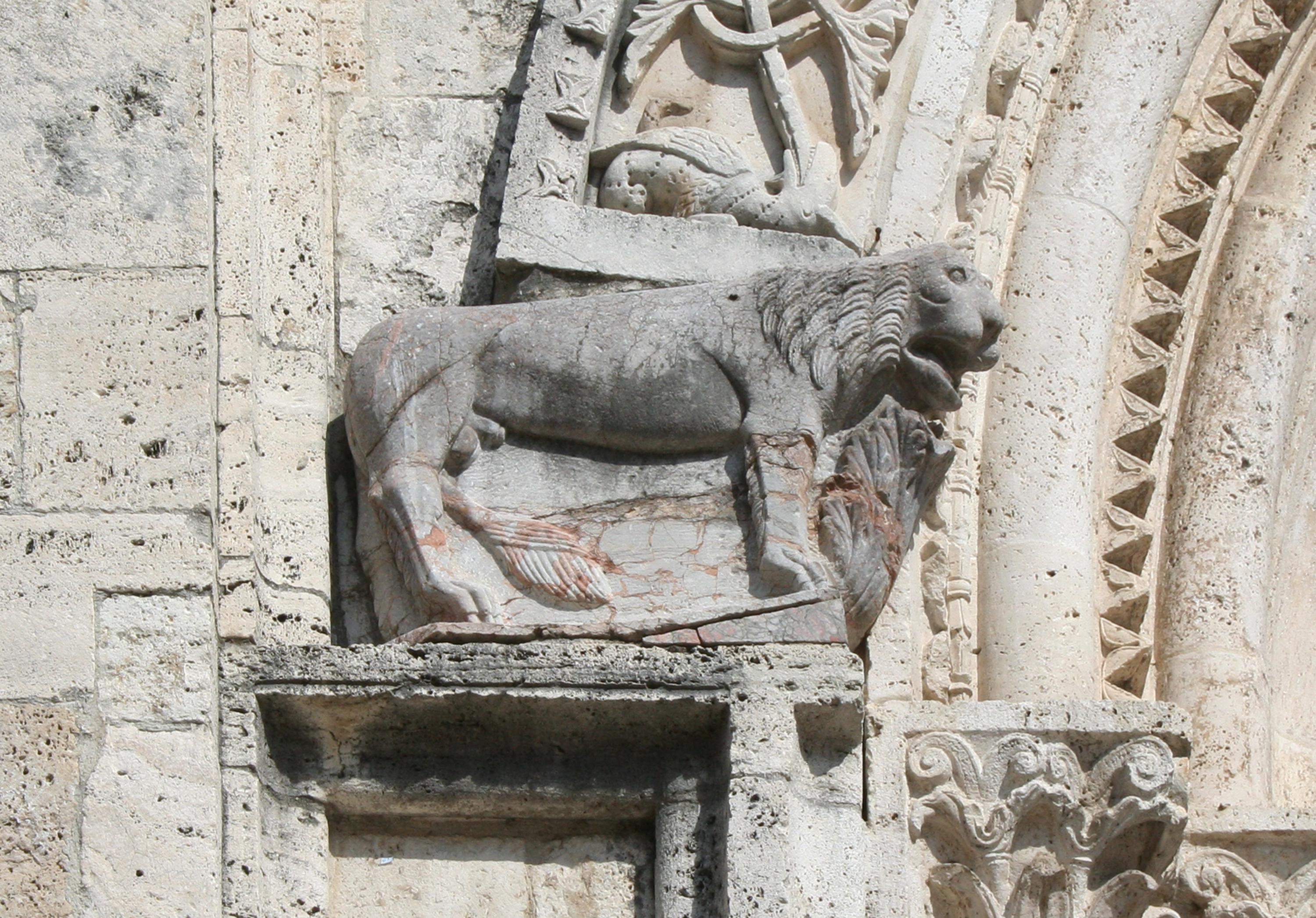 Leoncino scolpito alla base dell'imposta dell'arco della chiesa dei Santi Vincenzo e Anastasio di Ascoli Piceno.